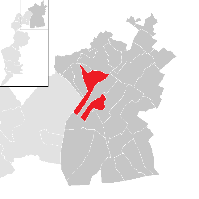 Bezirk Neudsiedl am See